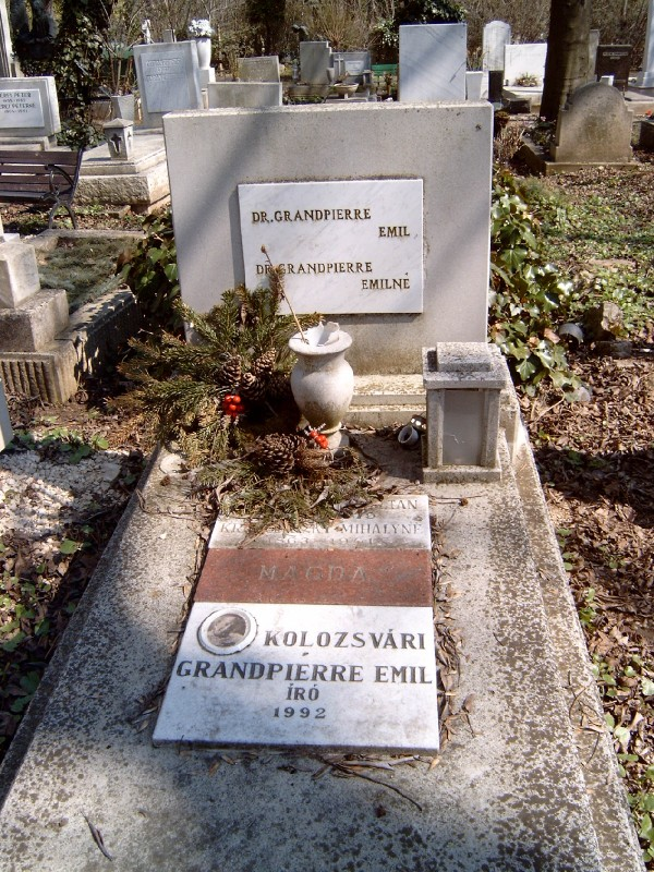 Kolozsvári Grandpierre Emil sírja Budapesten. Farkasréti temető: 7/4-1-103.